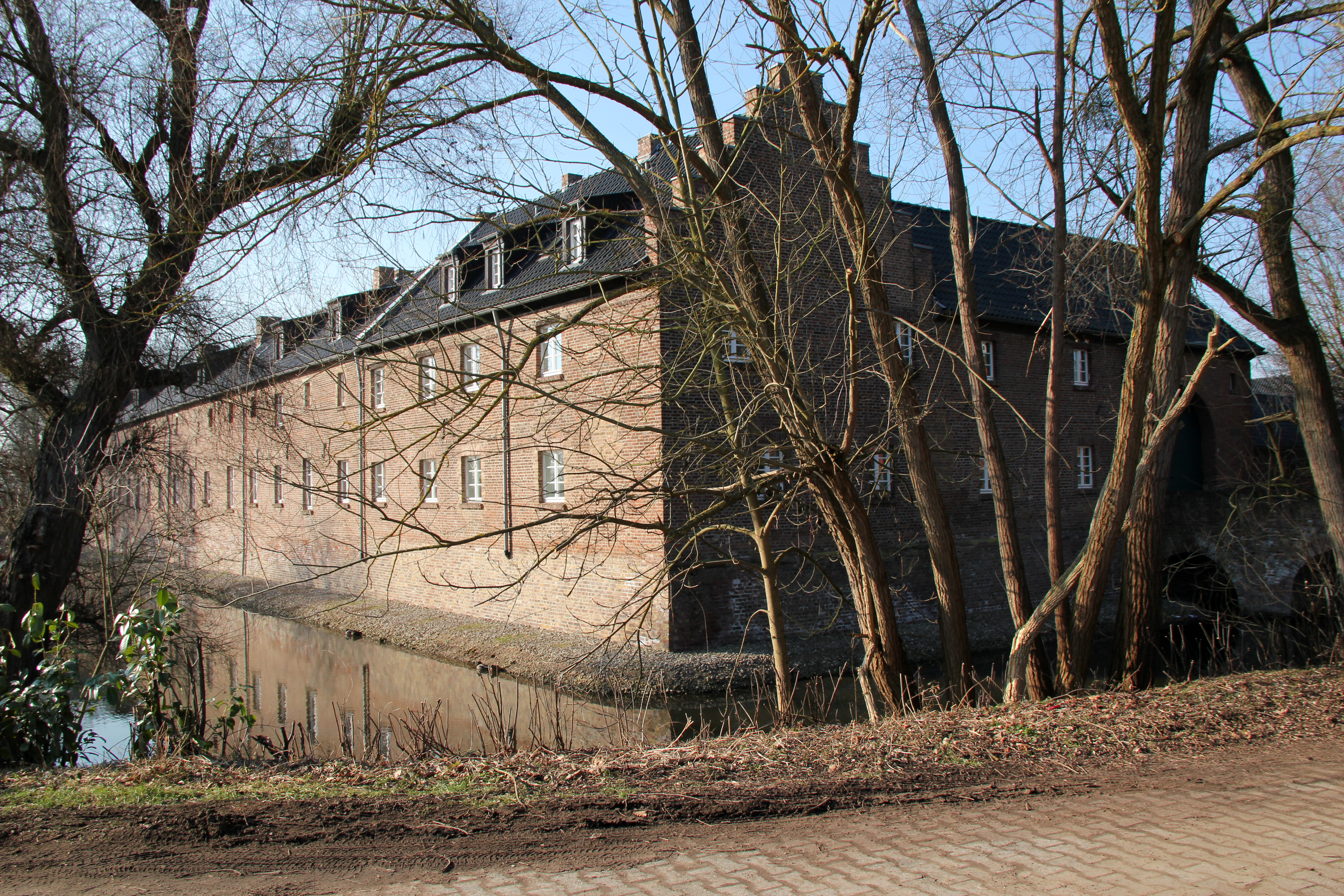 Haus Buschfeld, Vorburg und Graben